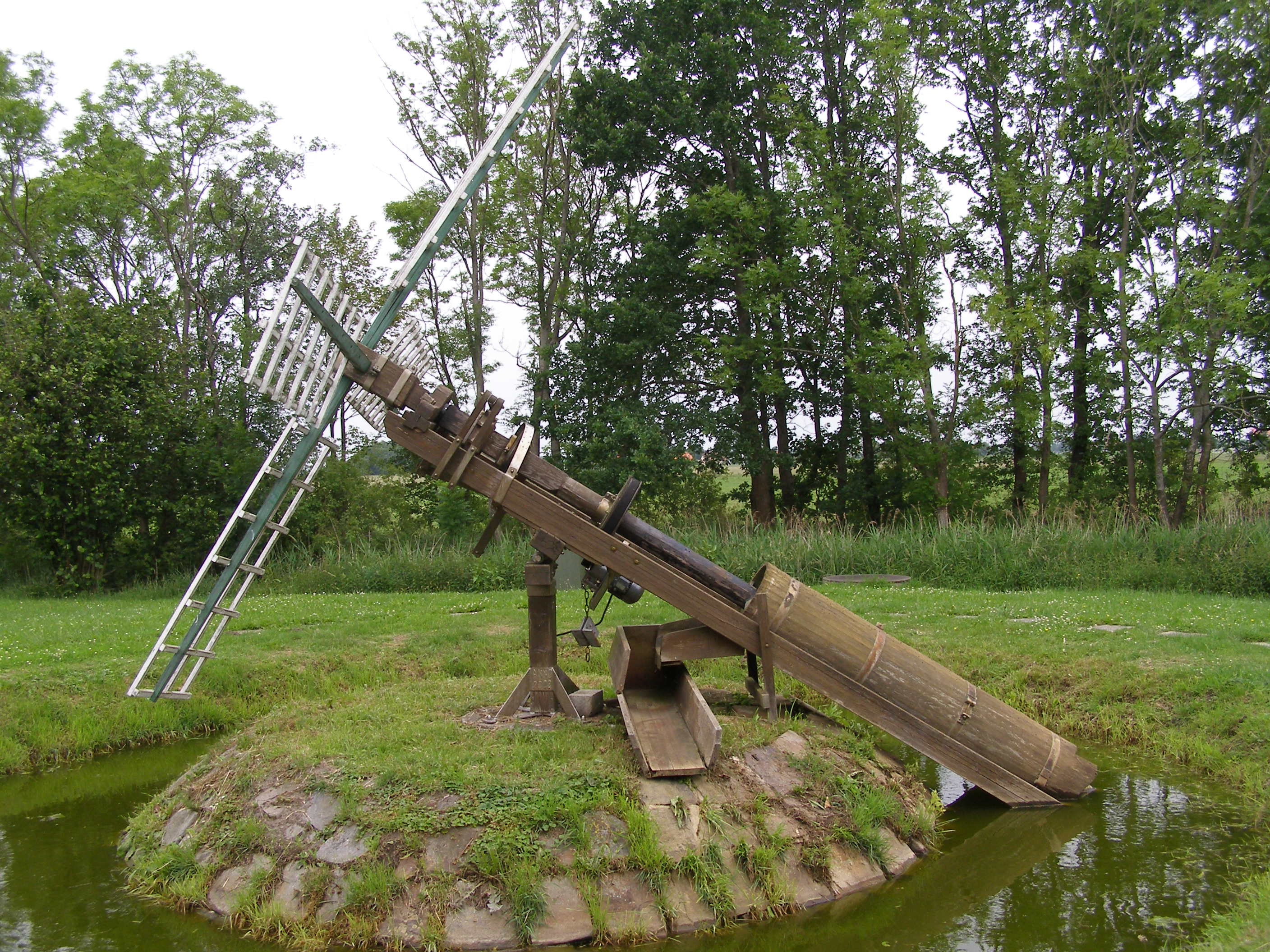 Die Fluttermühle am Museum Moorseer Mühle in Nordenham-Abbehausen. Bild: Archiv Museum Moorseer Mühle